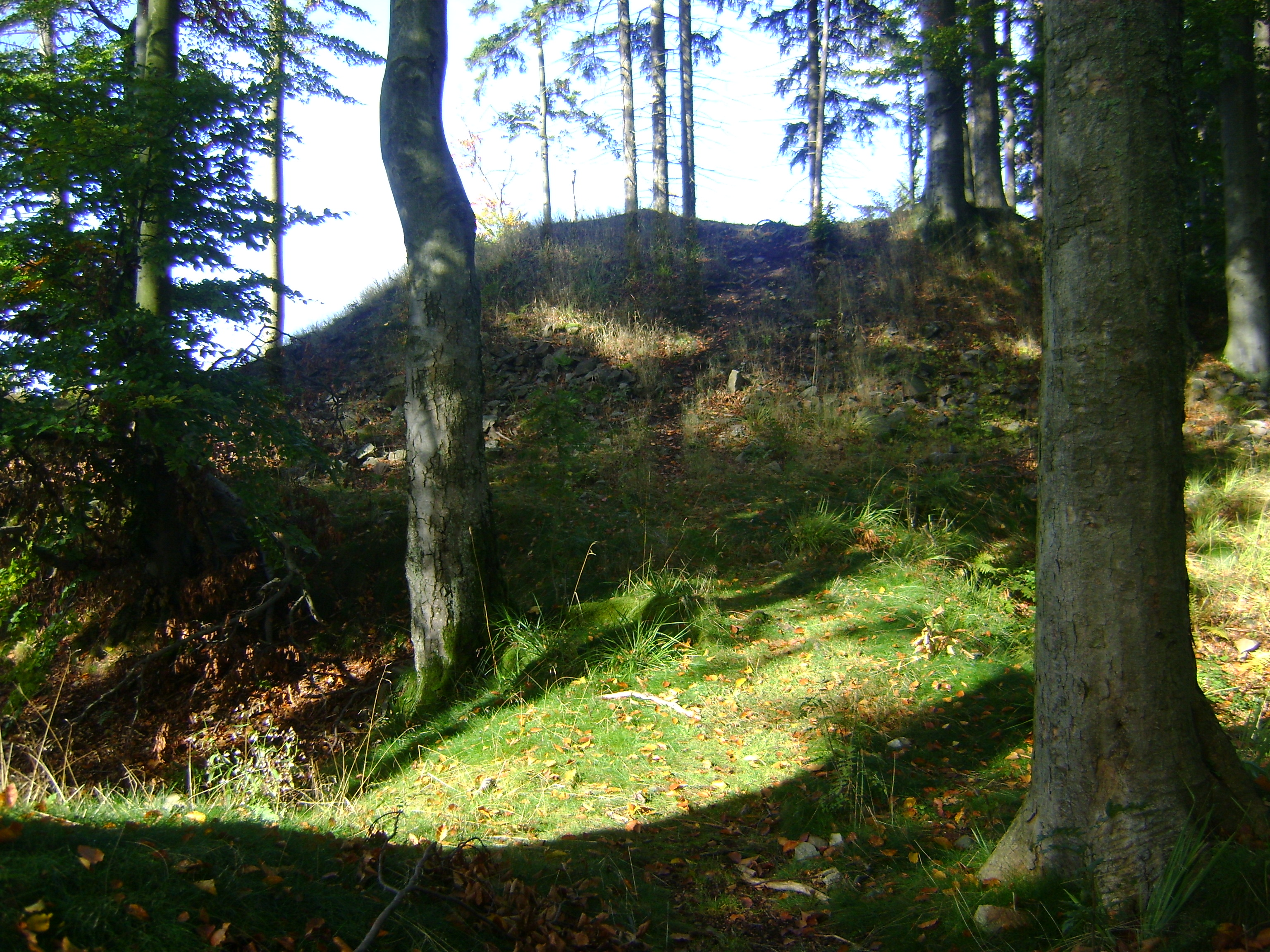 hrádek Henkšt (Hengst), Z od vsi, Hutě pod Třemšínem